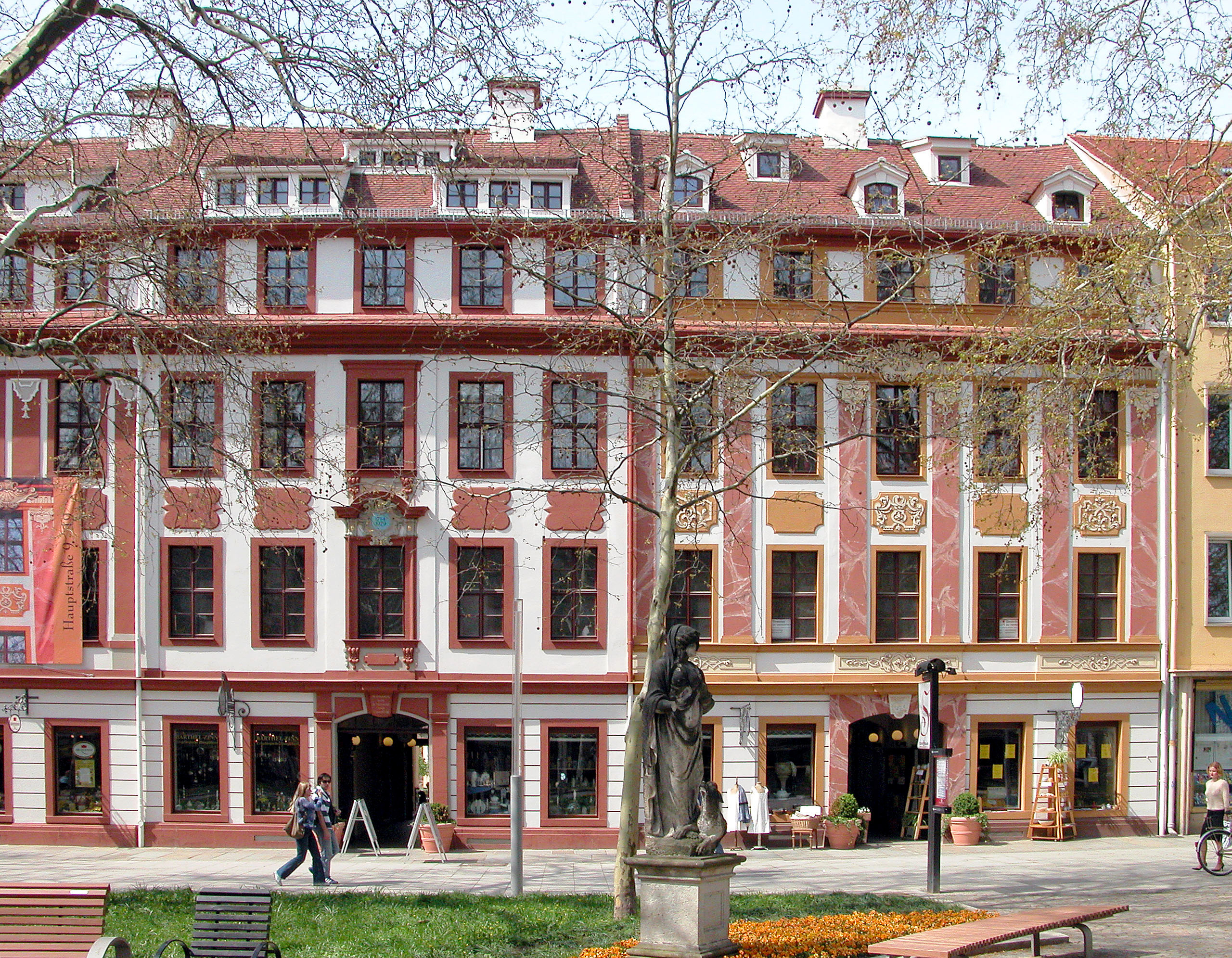 22.04.2004 01097 Dresden-Innere Neustadt: Die Hauptstraße entstand bis 1730 nach Plänen von Wolf Caspar von Klengel. Der Großteil der alten Bebauung wurde bei der Bombardierung 1945 zerstört. Links Hauptstraße 17 (GMP: 51.060197,13.743034) - hier wohnten einst Johann Gottfried Knöffler und Benjamin Thomae. Rechts Hauptstraße 19 (GMP: 51.060289,13.743118). - Thomae-Haus, erbaut um 1716. Vorderhaus zum Societaetstheater, Haus 1979 rekonstruiert. [DSCN2839.TIF]20040422320DR.JPG(c)Blobelt